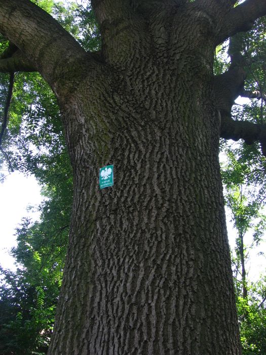 Pomnik przyrody - jesion przy ul. Łaskowej